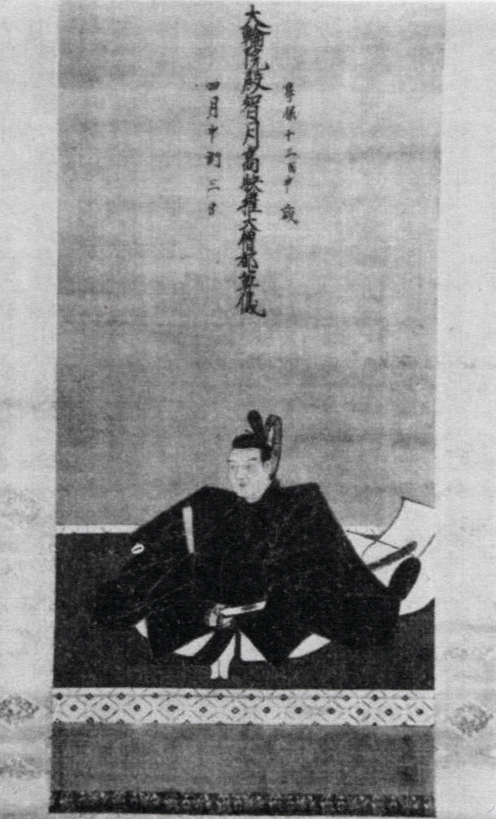 藤堂高敏の肖像(モノクロ)。